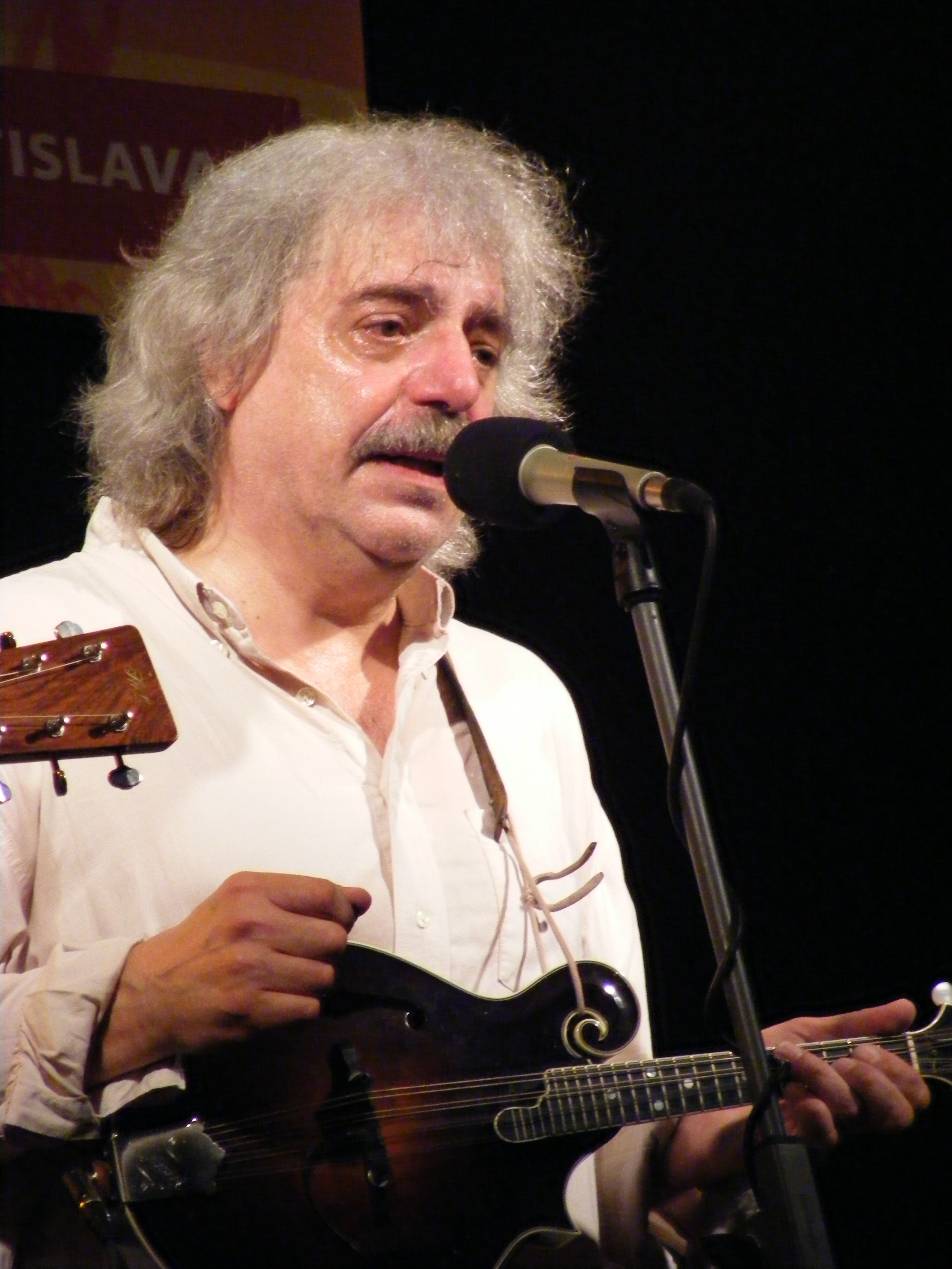 Robert Krestan in Bratislava, August 2008.